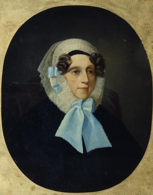 Анна Александровна Голицына, ур. Грузинская (1763-1842), в 1 браке за А.А.Делицыным (1768-1789), во 2 браке с 1789 года жена князя Б.А.Голицына (1766-1822).